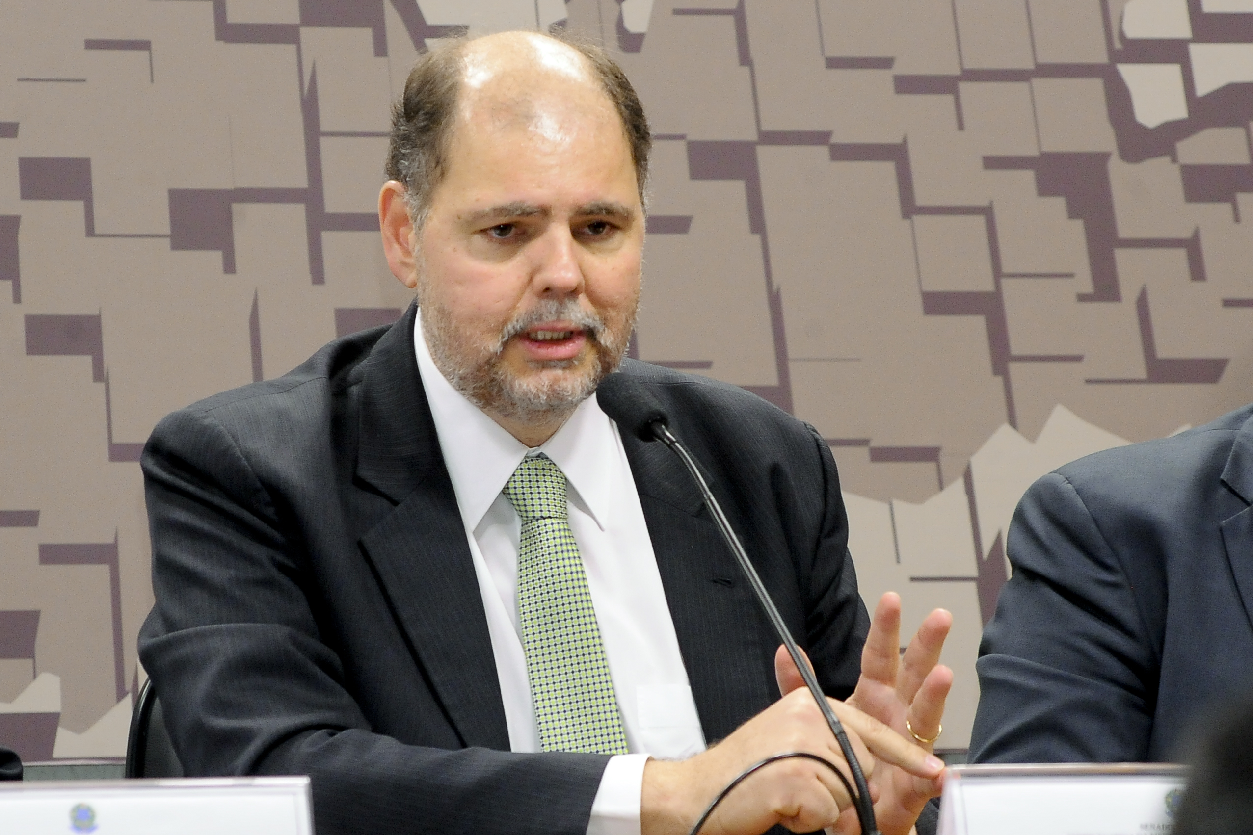 Comissão Mista da Medida Provisória (CMMPV) nº 785, de 2017, que trata da reforma do Fundo de Financiamento Estudantil (Fies), realiza audiência pública com a participação de representantes do Ministério da Integração Nacional, do BNDES e da Febraban. Em pronunciamento, relator da CMMPV 785/2017, deputado Alex Canziani (PTB-PR). Foto: Waldemir Barreto/Agência Senado